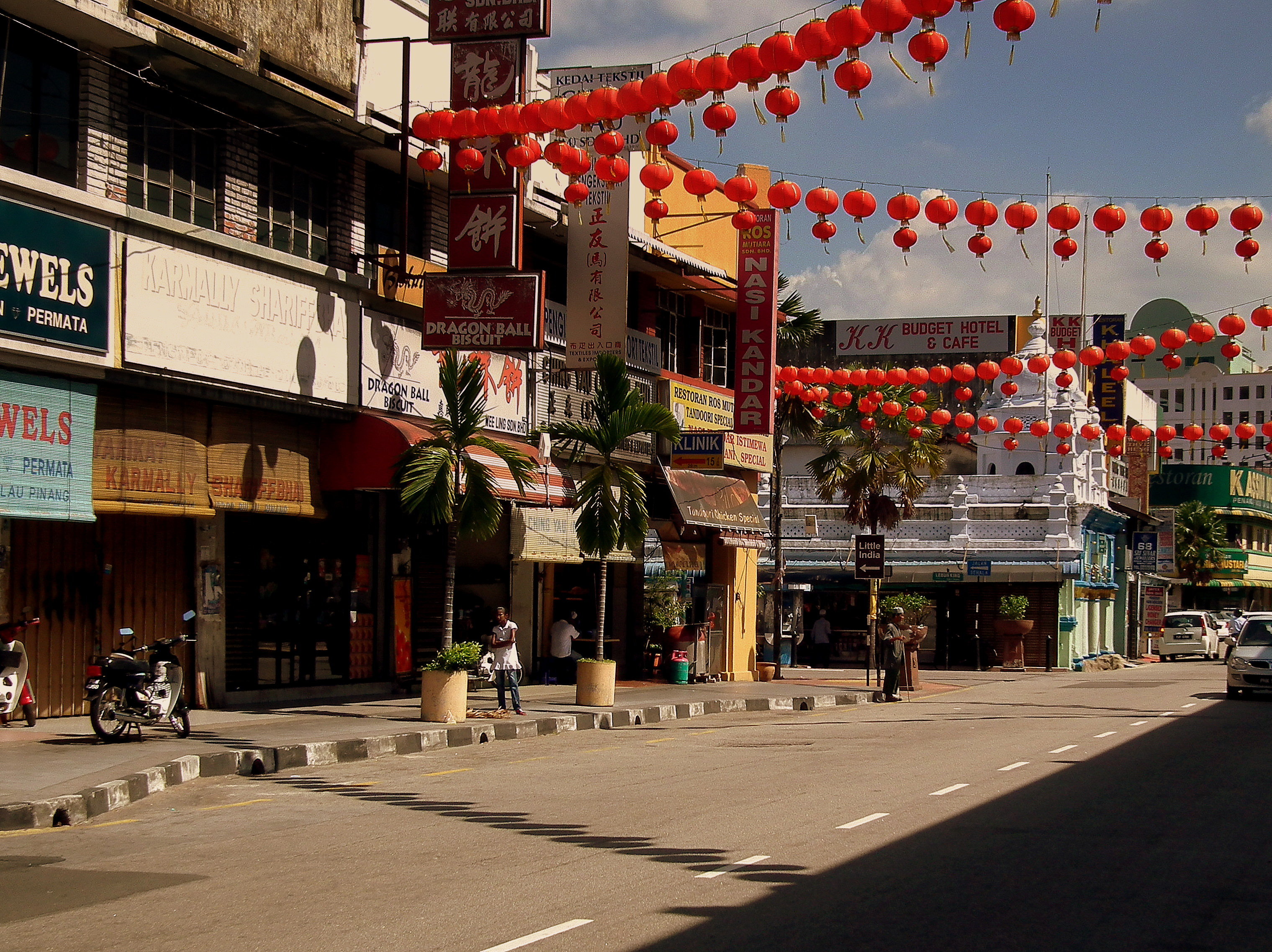 GEORGETOWN PENANG NEAR LITTLE INDIA,WITH CHINESE NEW YEAR DECORATIONS MALAYSIA JAN 2012